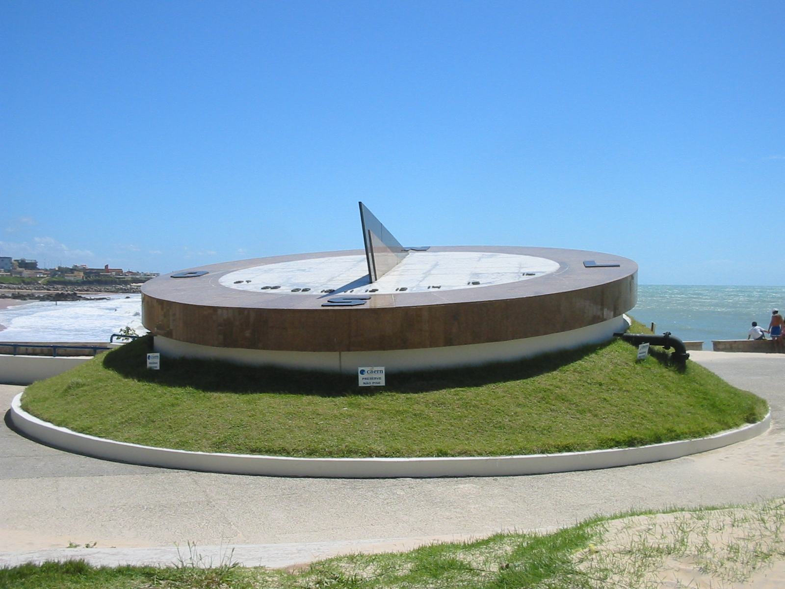 Natal (Rio Grande do Norte), Brasil. Relógio de sol de Areia Preta. Sundial. Areia Preta. Natal (Rio Grande do Norte), Brazil.